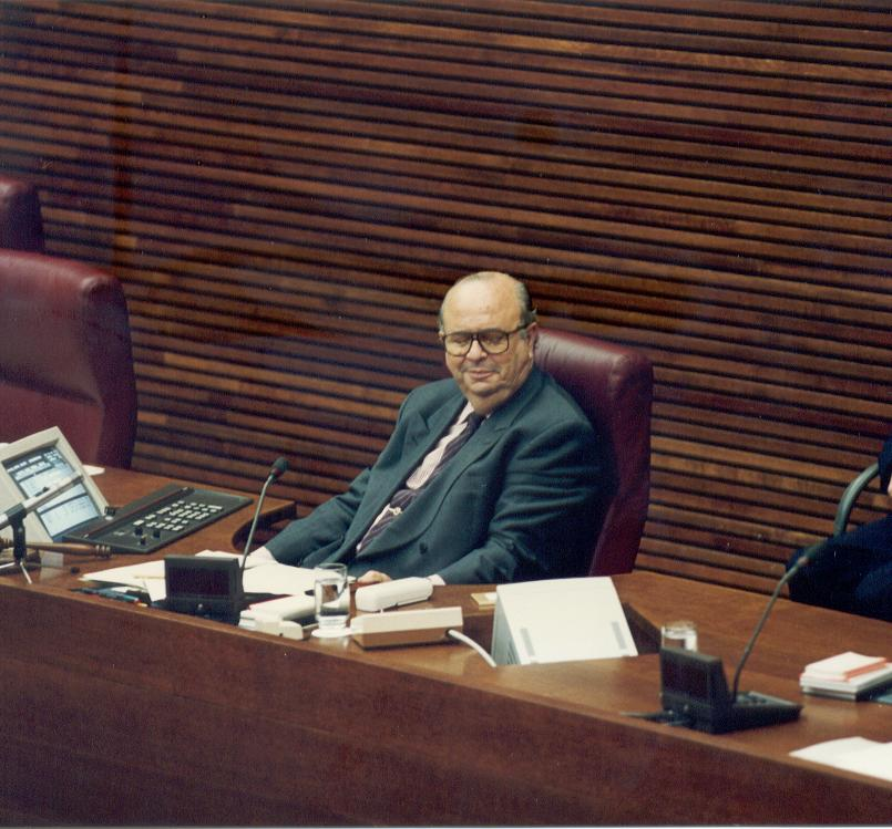 Valencia 1994. El Vicepresident de les Corts Valencianes (PP) presidint el Ple.